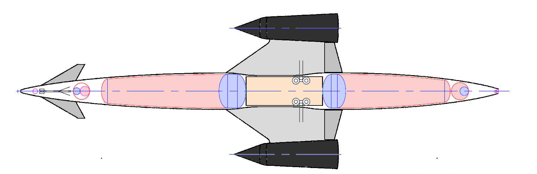 Position des réservoirs de l'avion spatial Skylon : en rose réservoir sd'hydrogène, en bleu réservoirs d'oxygène.